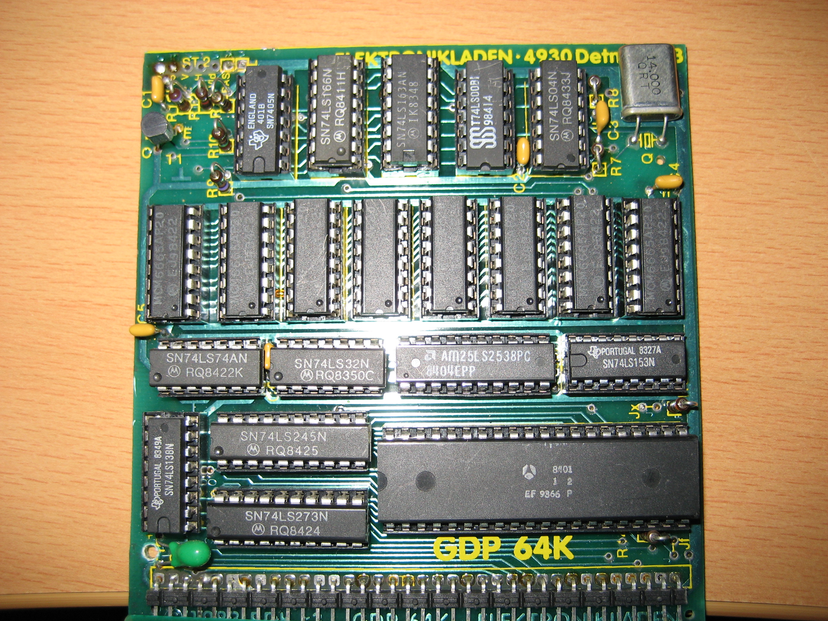 64K RAM Grafikkarte des NDR-Klein Computers